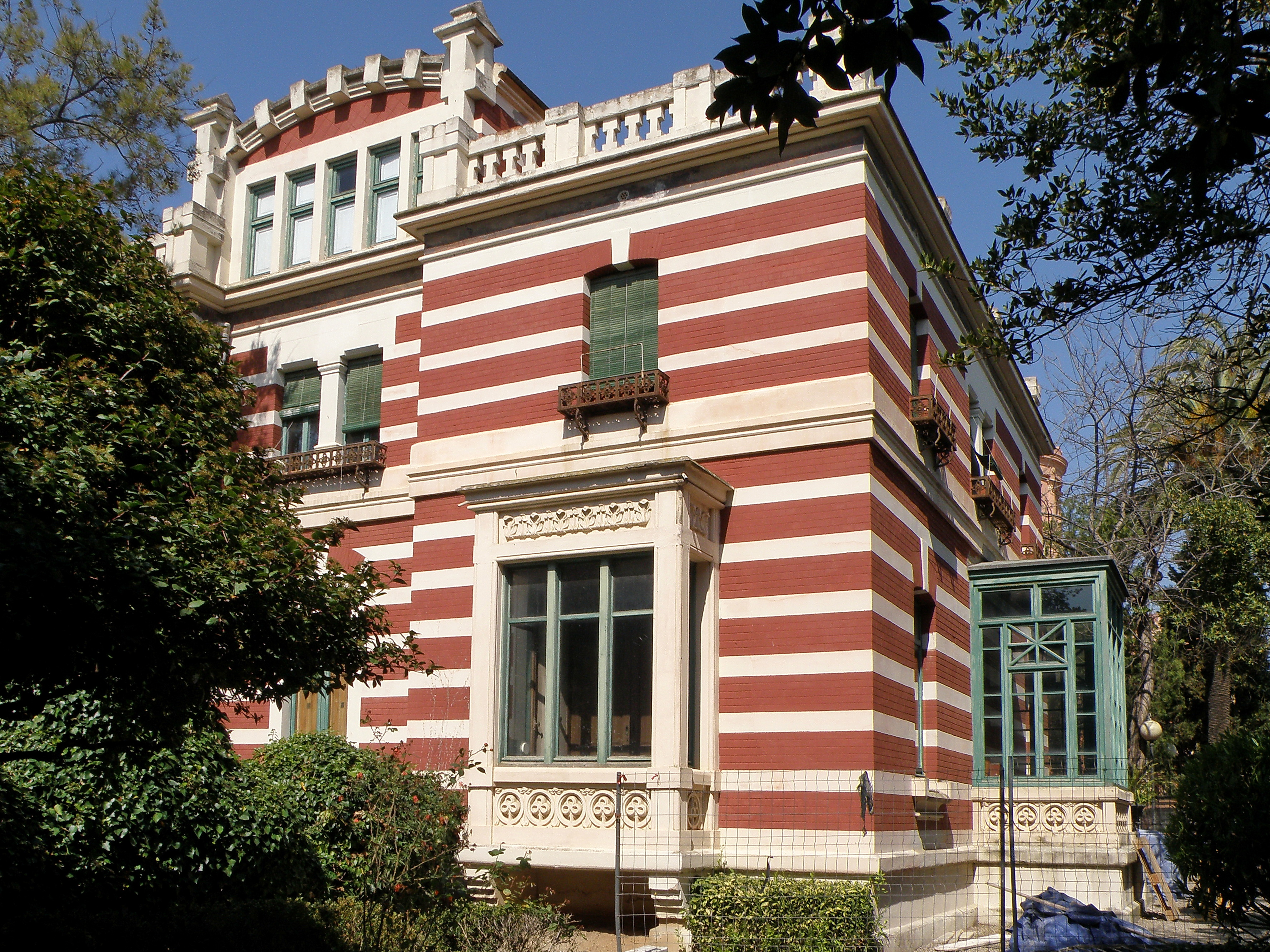 Casa de Santa Teresa de Vilanova i la Geltrú